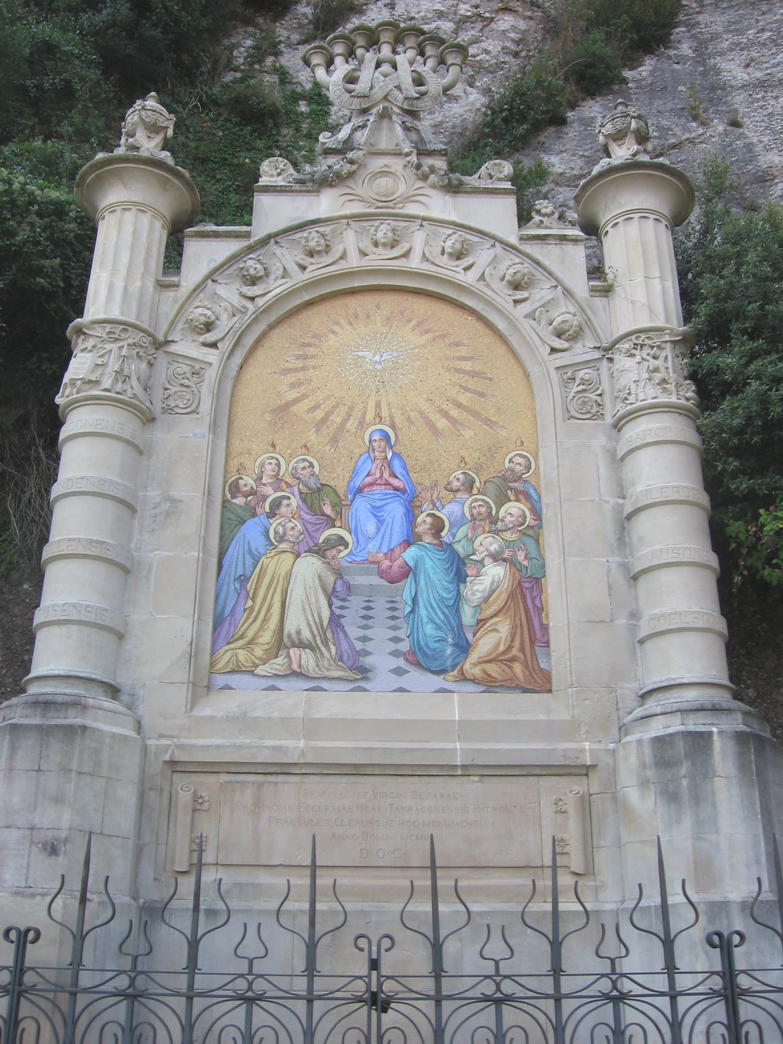 Rosario Monumental de Montserrat: Tercer Misterio de Gloria. El Pentecostés. Obra del arquitecto Joan Martorell y del escultor Josep Maria Barnadas, con mosaico de Mario Maragliano.